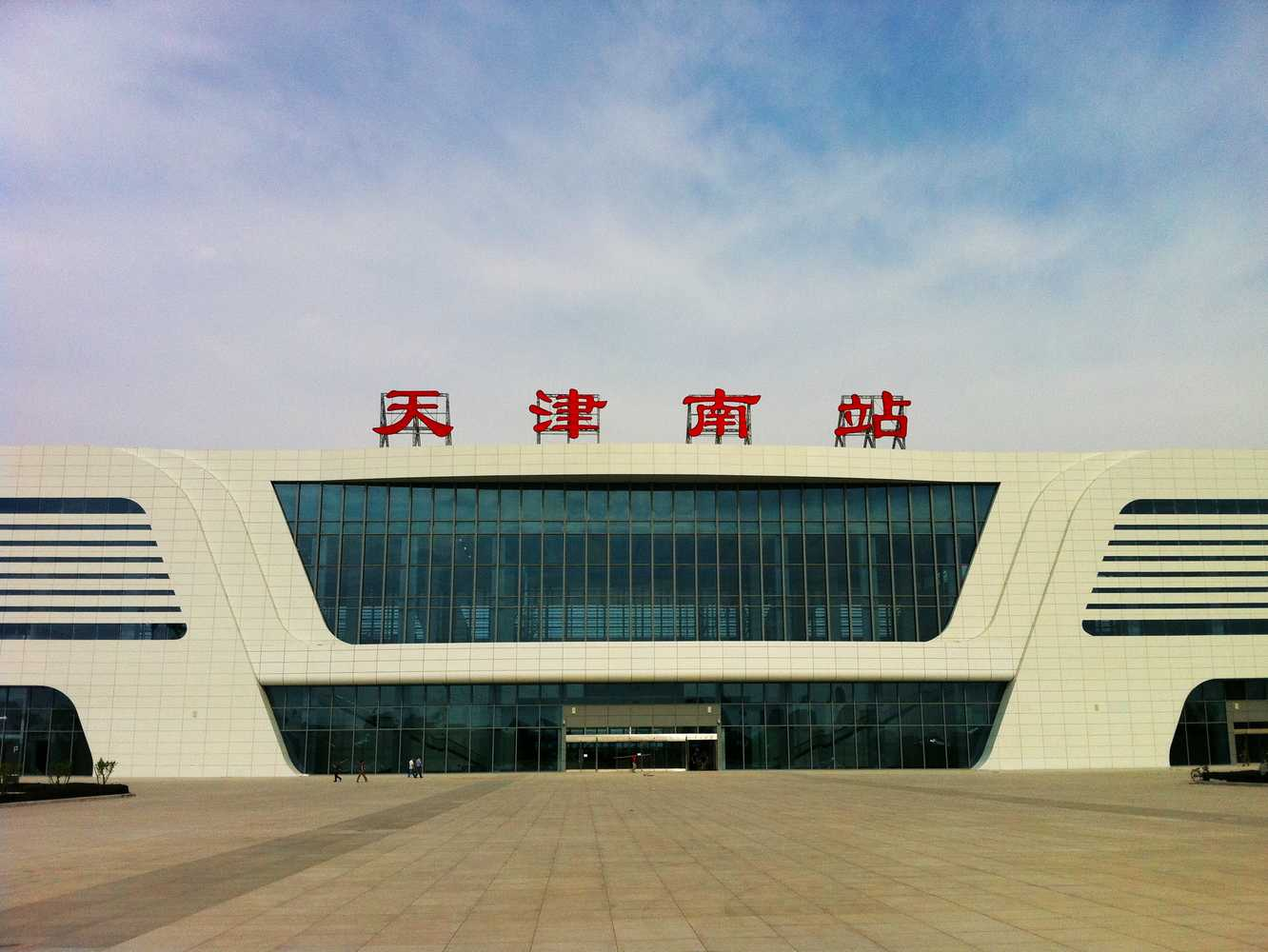 天津南站前广场